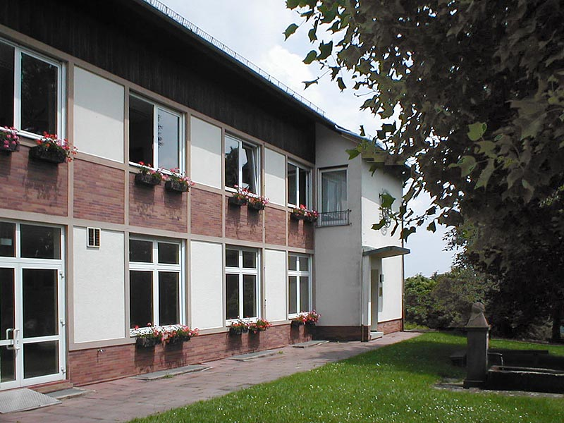 Rathaus in Schönbrunn (Baden)